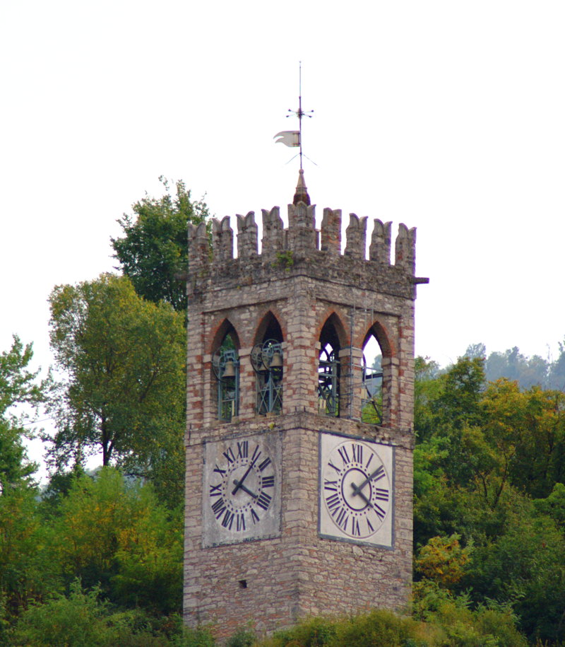 Chiampo Autore: Alfio Musmarra, licenzacreative commnons: cc-by-sa